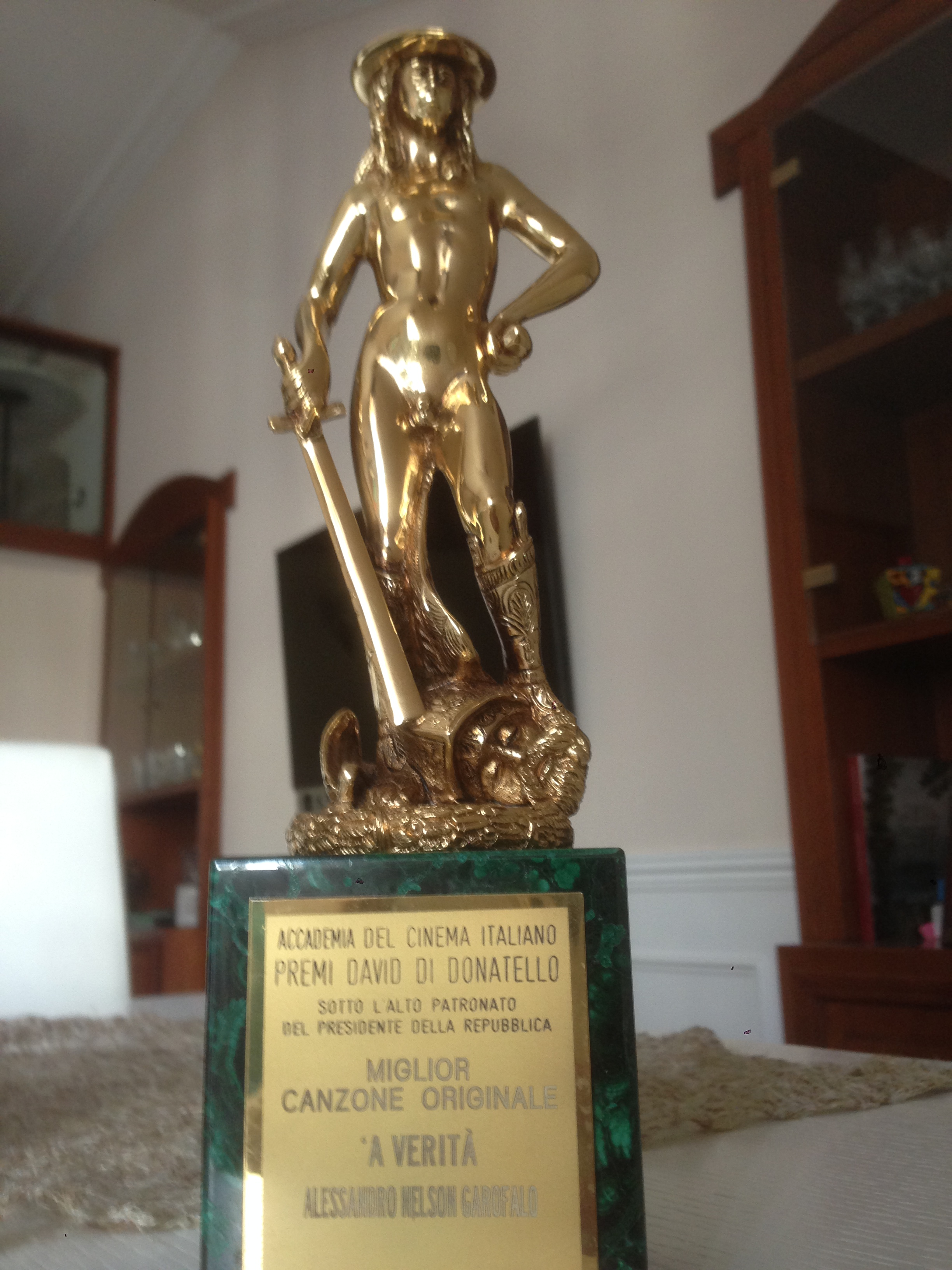 David di Donatello- Miglior canzone originale 2014 ad Alessandro Nelson Garofalo- autore della parte letteraria.